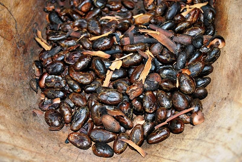 Bikol Central: Sinanlag na kakaw